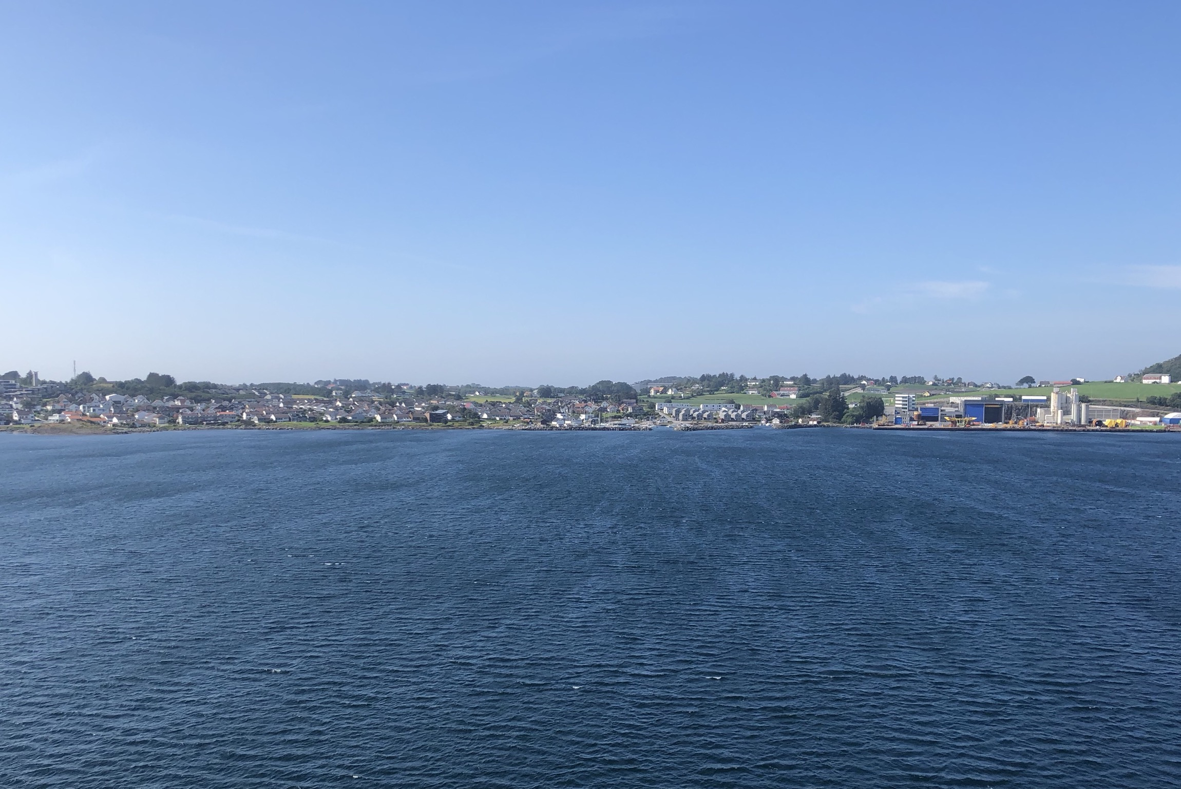 Grødem 2019